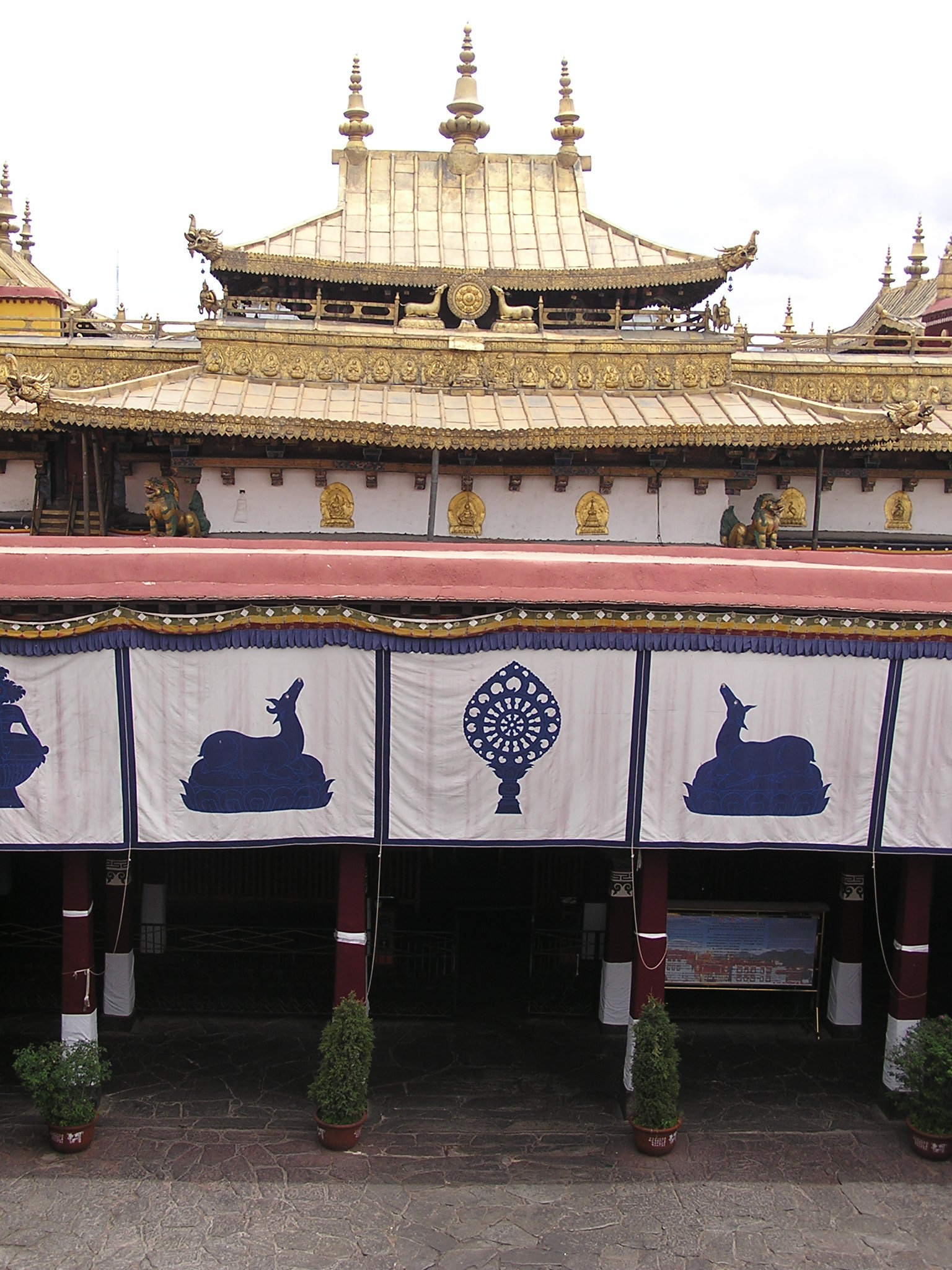 Jokhang Monastery 21.